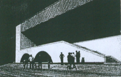 Veszprémi úttörő ház vázlat. 1978